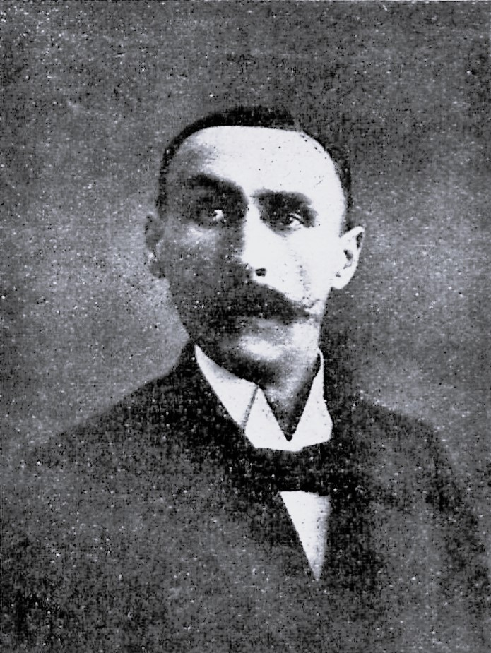 Senator William Bromme.